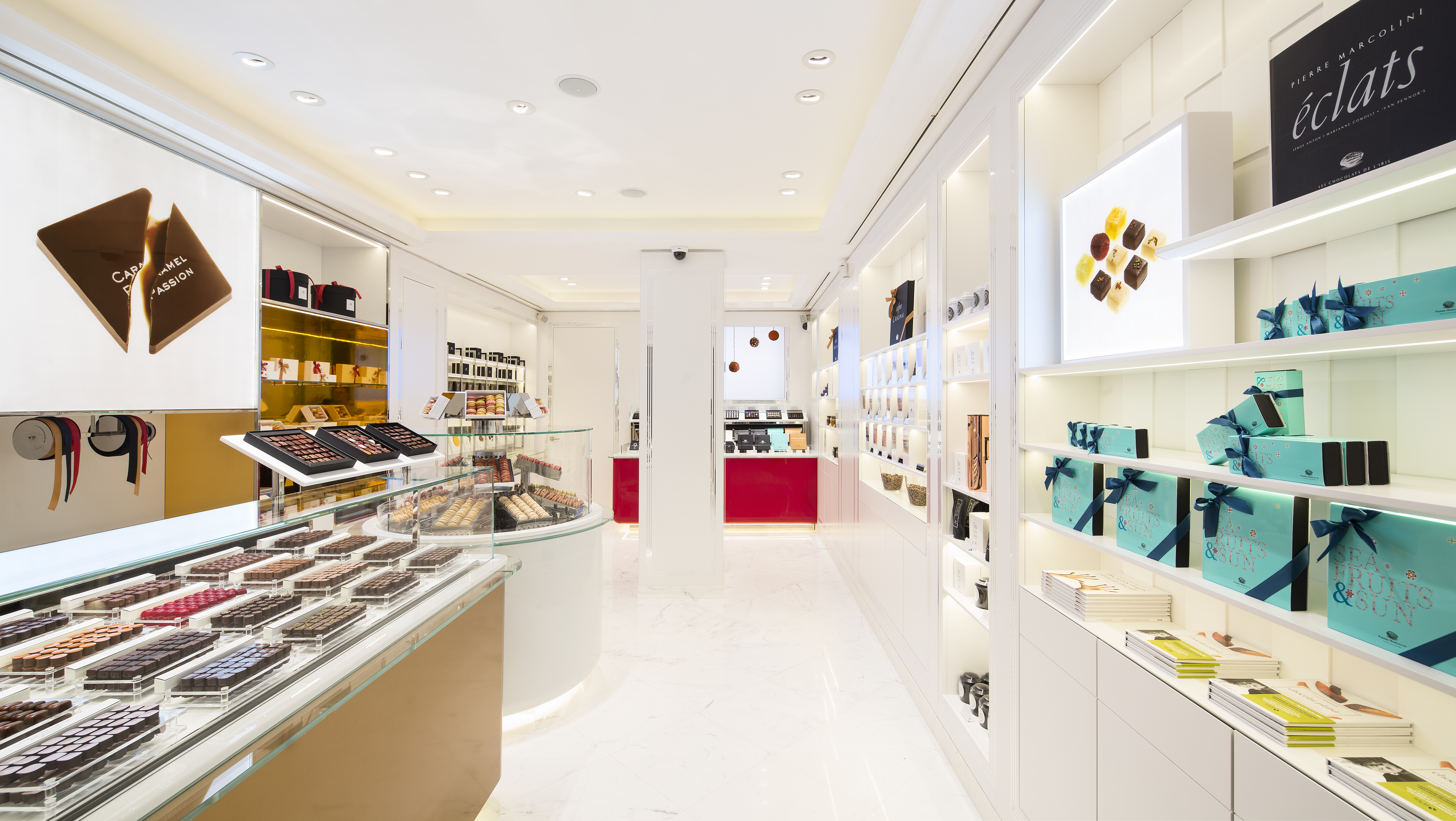 Intérieur de la Boutiquede Pierre Marcolini, 235 Rue Saint-Honoré, 75001 Paris, France.